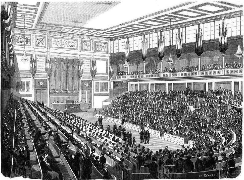 "Vue intérieure de la salle de l'Assemblée nationale".